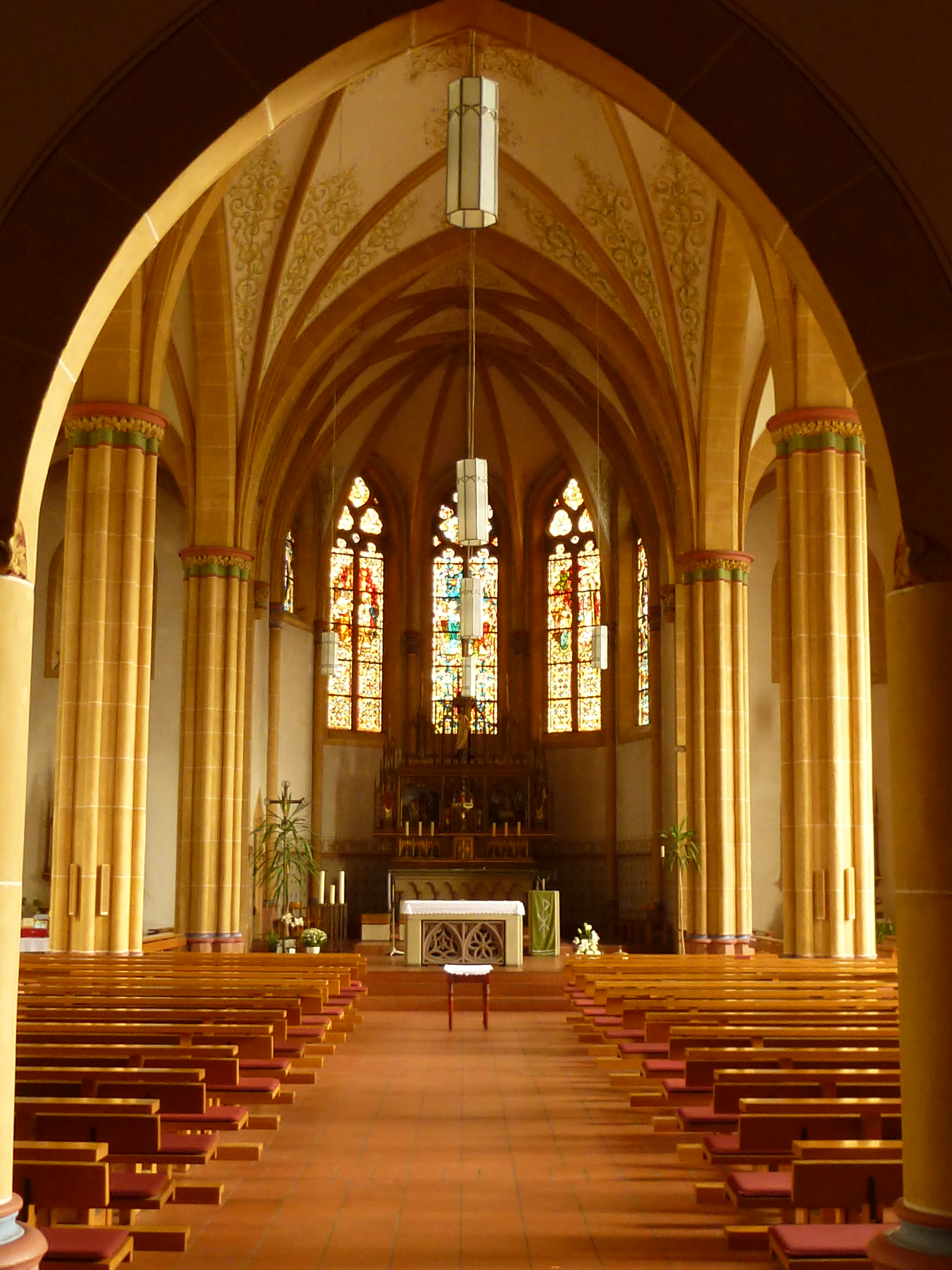 Blick durch das Mittelschiff zum Altarraum.